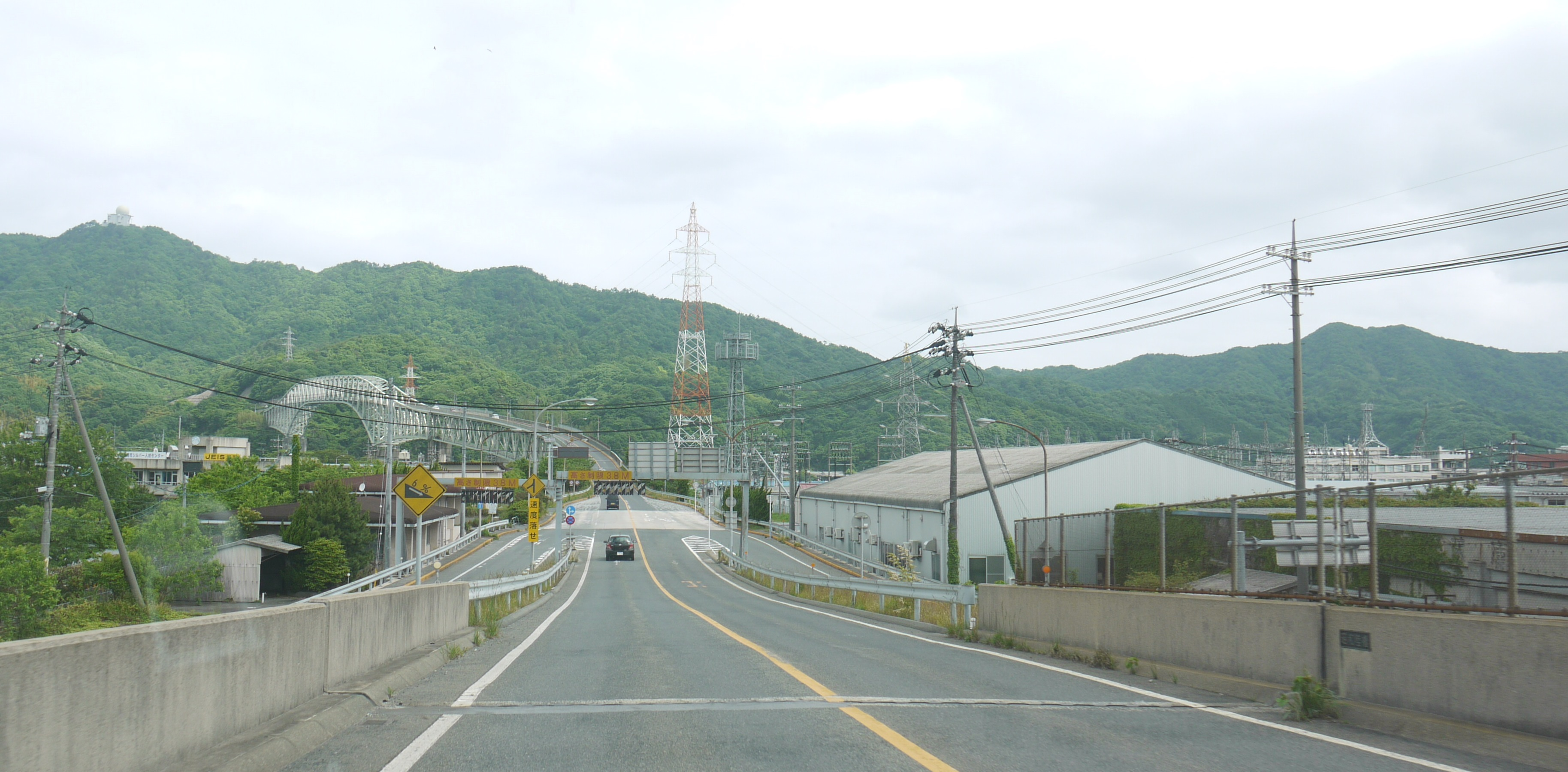 2010年5月の境水道大橋